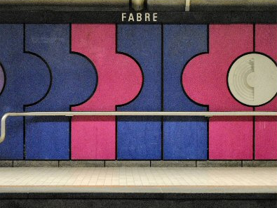 Mur de la station